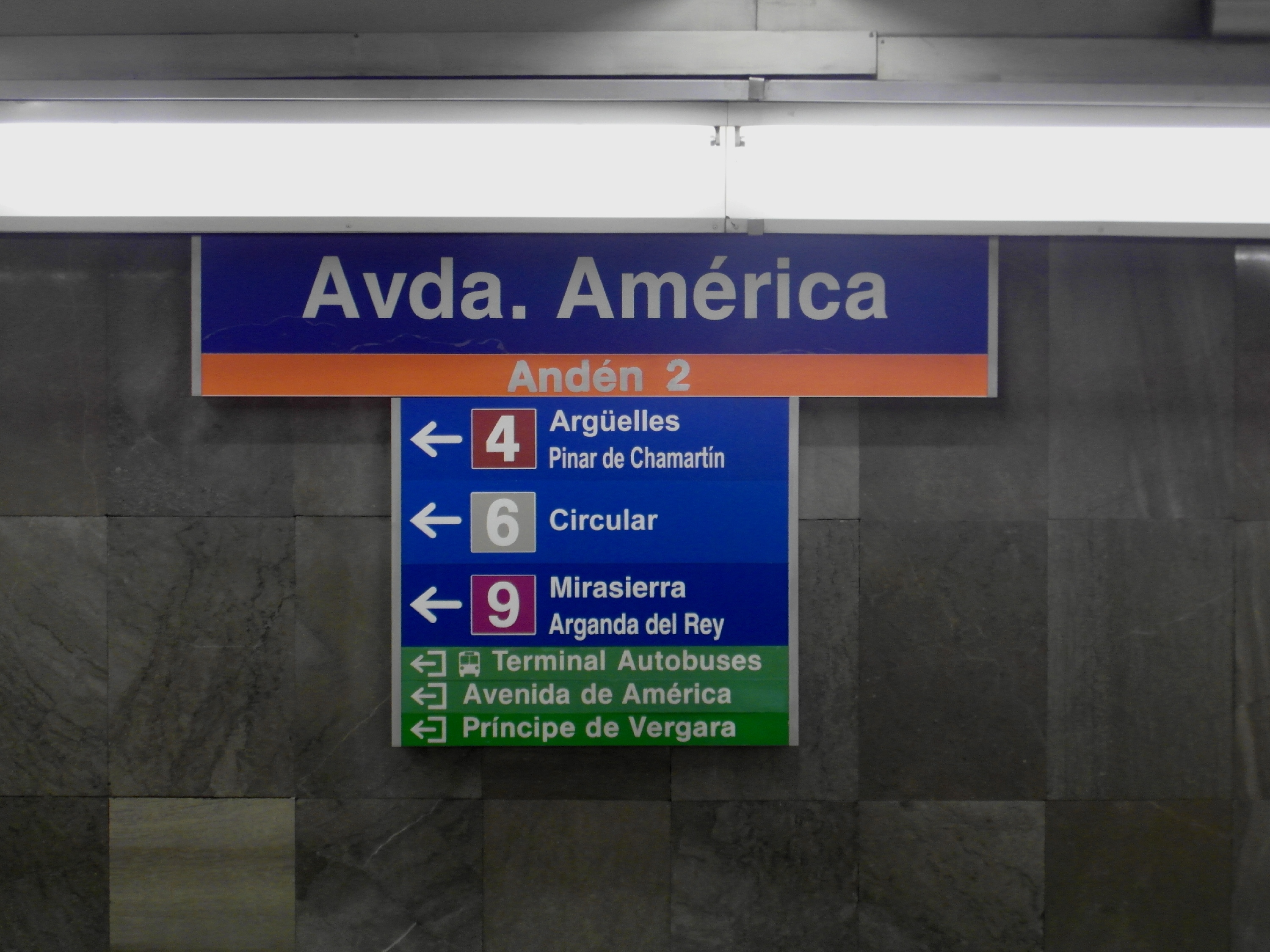 Madrid - Metro - Estación de Avenida de América